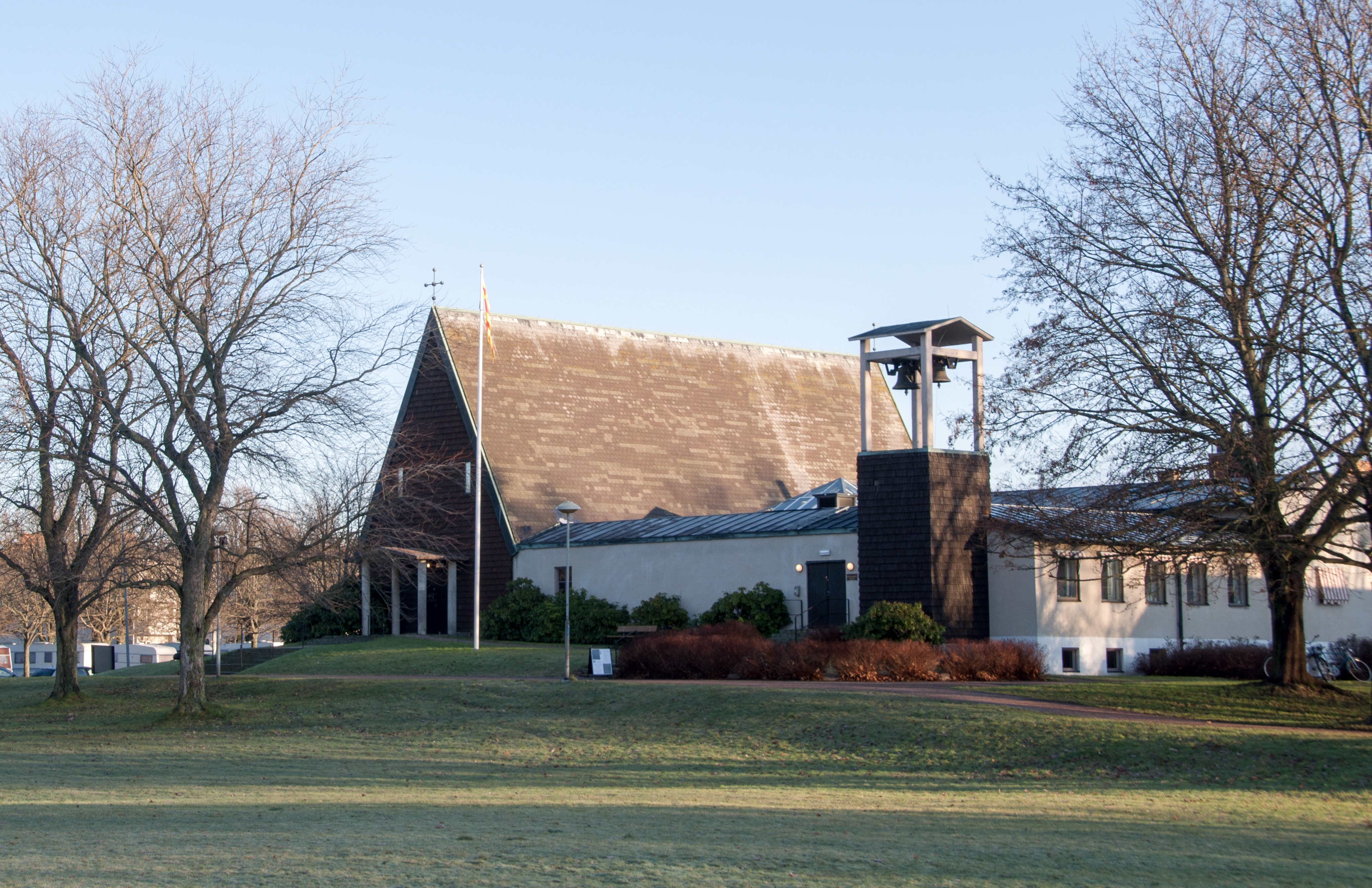 Norrstrandskyrkan. Byggnadsår 1959. Arkitekt Sten Hummel Gumælius